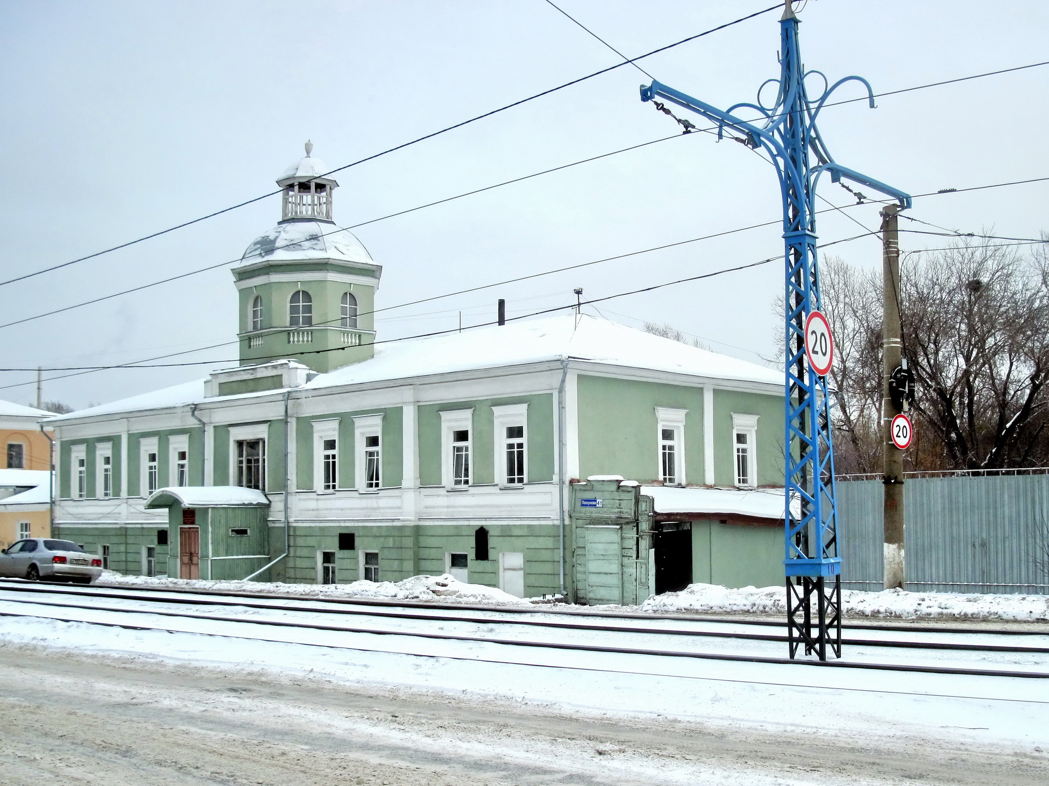 Барнаул Ул. Ползунова 41